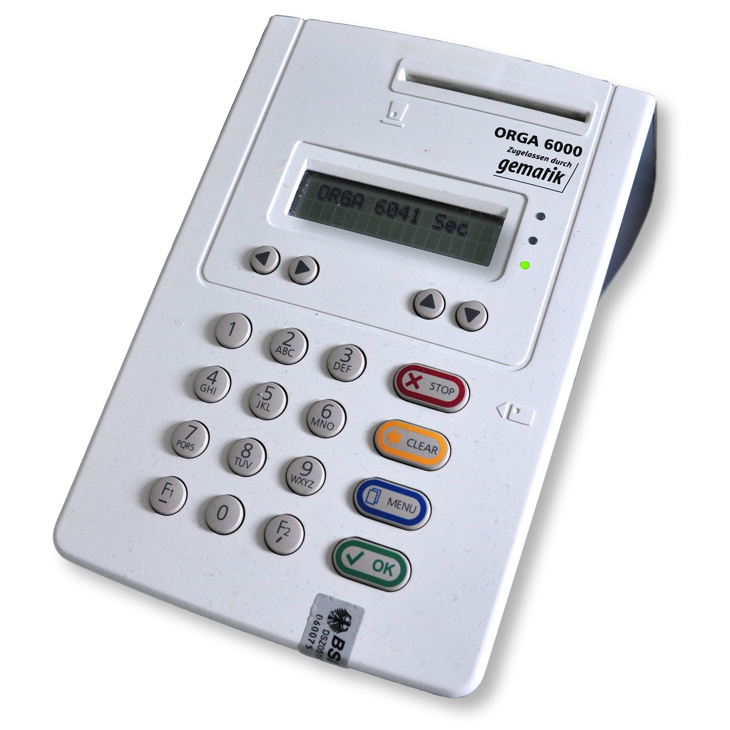 Chipkartenleser für Arztpraxis